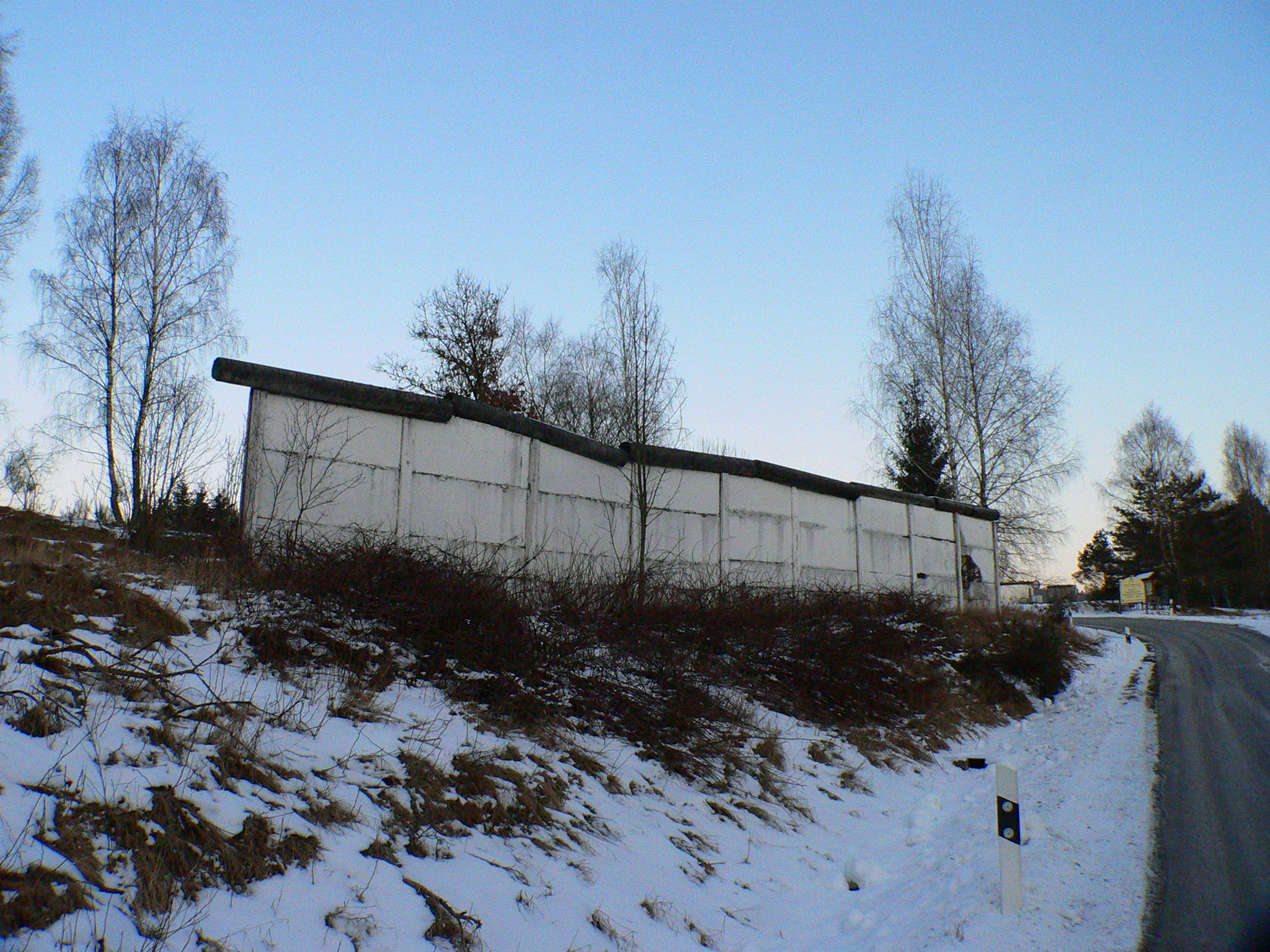 Rest der Grenzmauer in Schalkau-Görsdorf,Thüringen, Deutschland (Mahnmal an der deutsch/deutschen Grenze von 1961-1989)